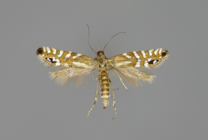 Glyphipterix thrasonella